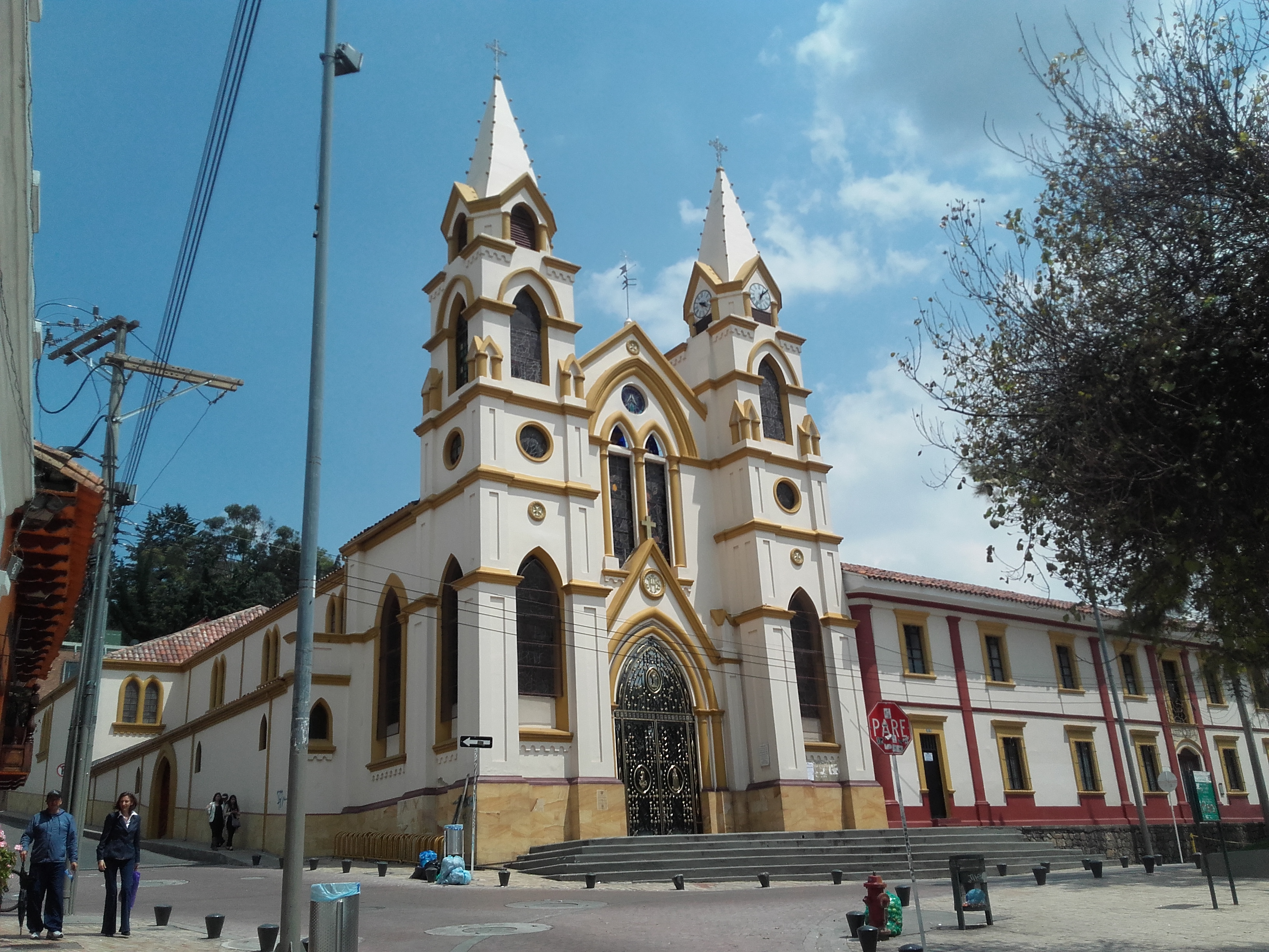 dkfkkrkrkrkrkrkrkkrkr